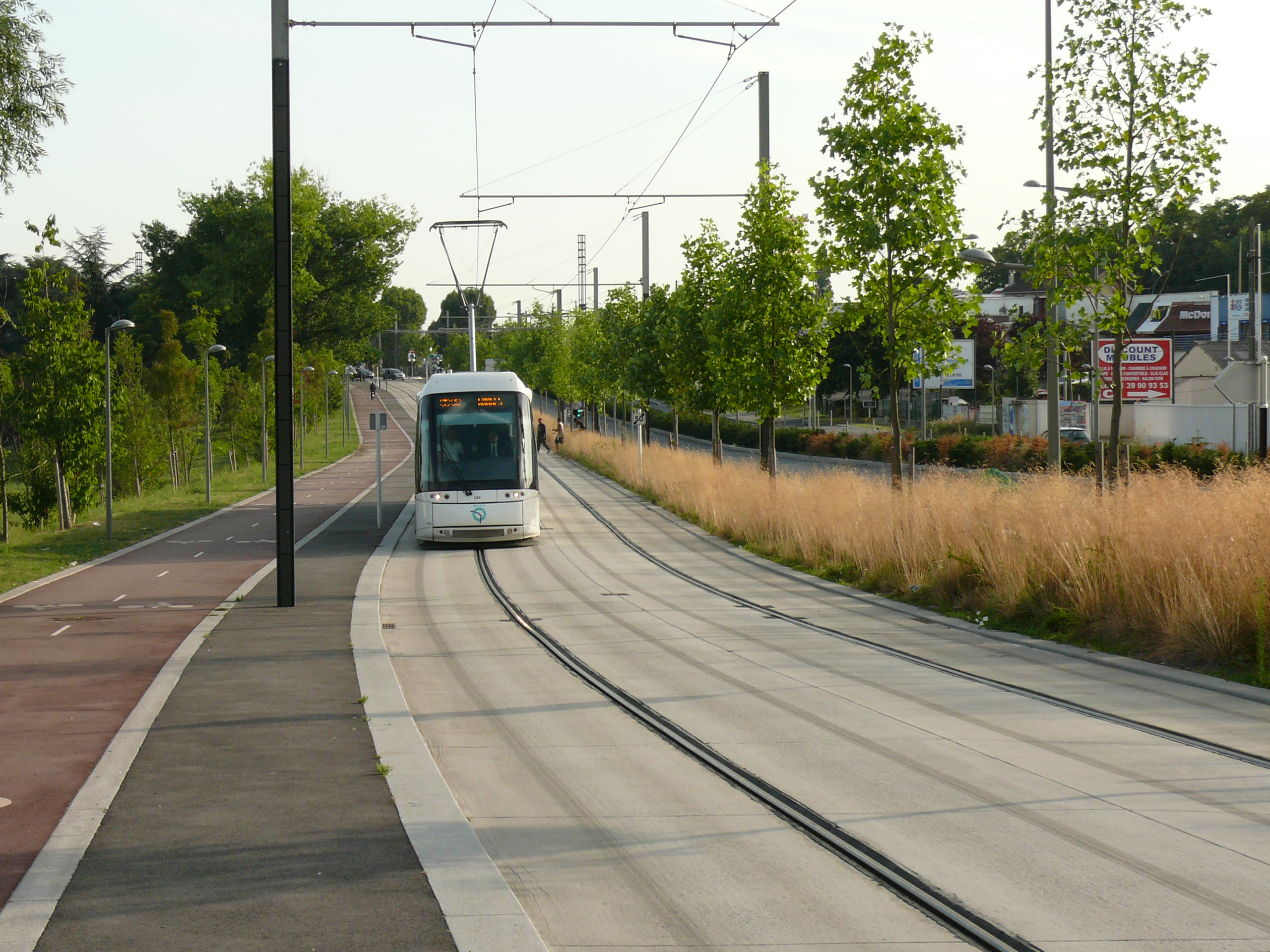 Réaménagement des abords de l'ex RN16 ("Pointe Trois-Quart") à Sarcelles